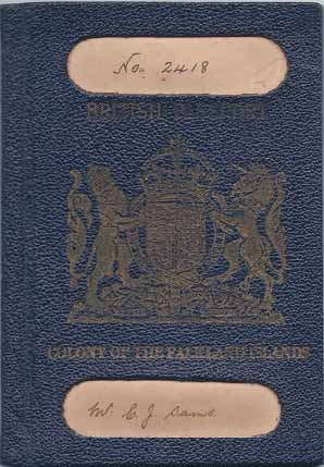 British passport of the Colony of the Falkland Islands, 1947.